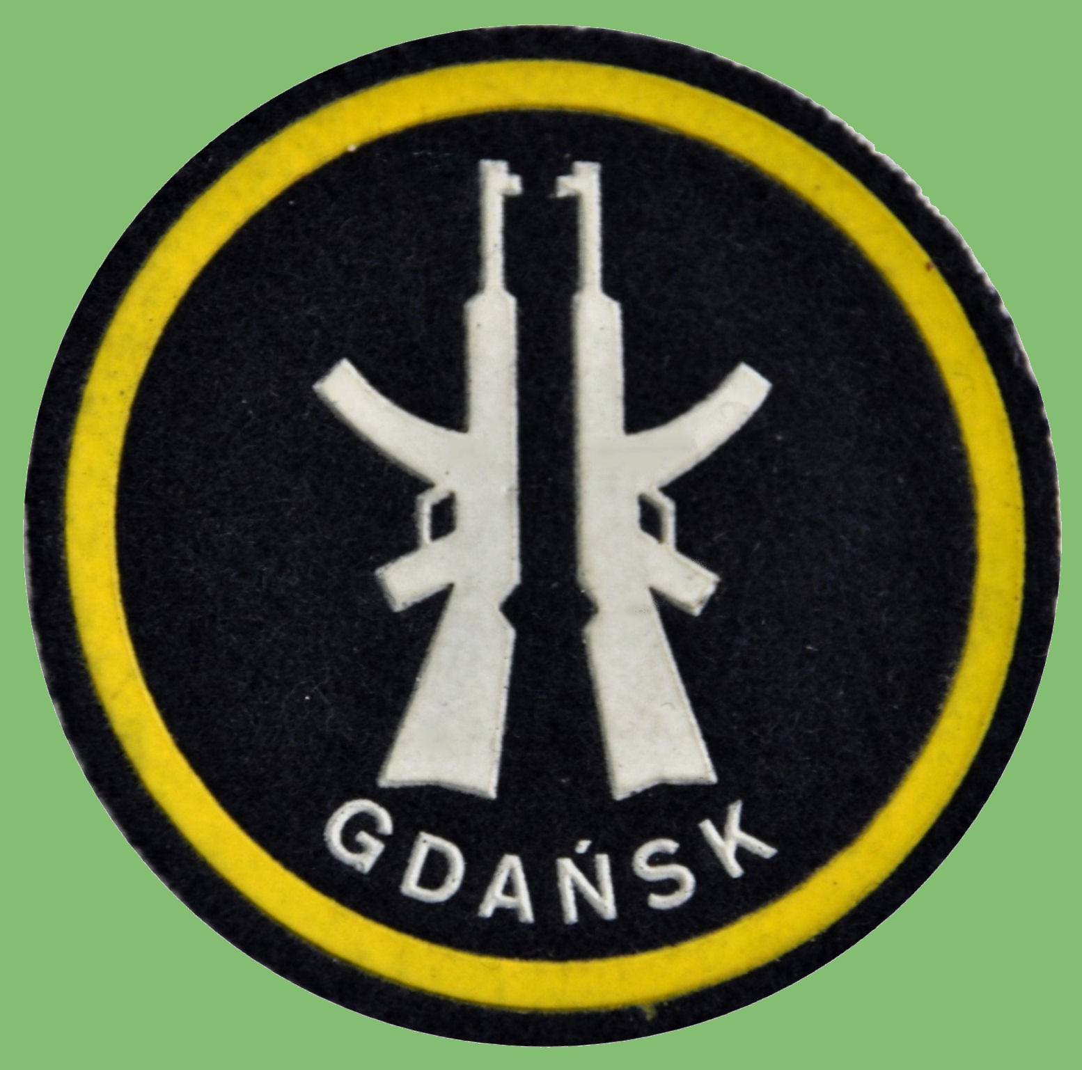 Oznaka OT Gdańsk (Gdański Pułk Obrony Terytorialnej).